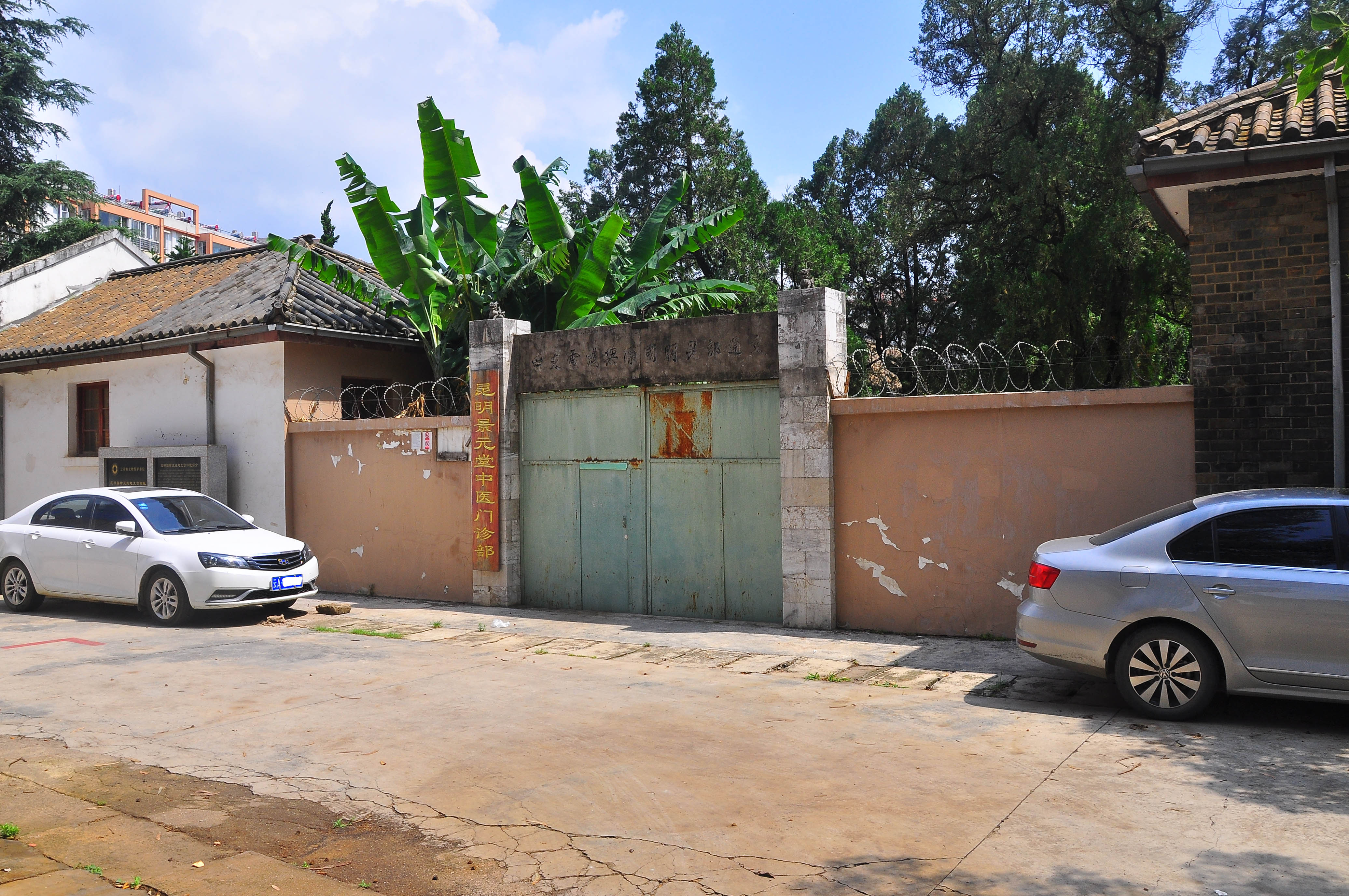 昆明团山发信台。